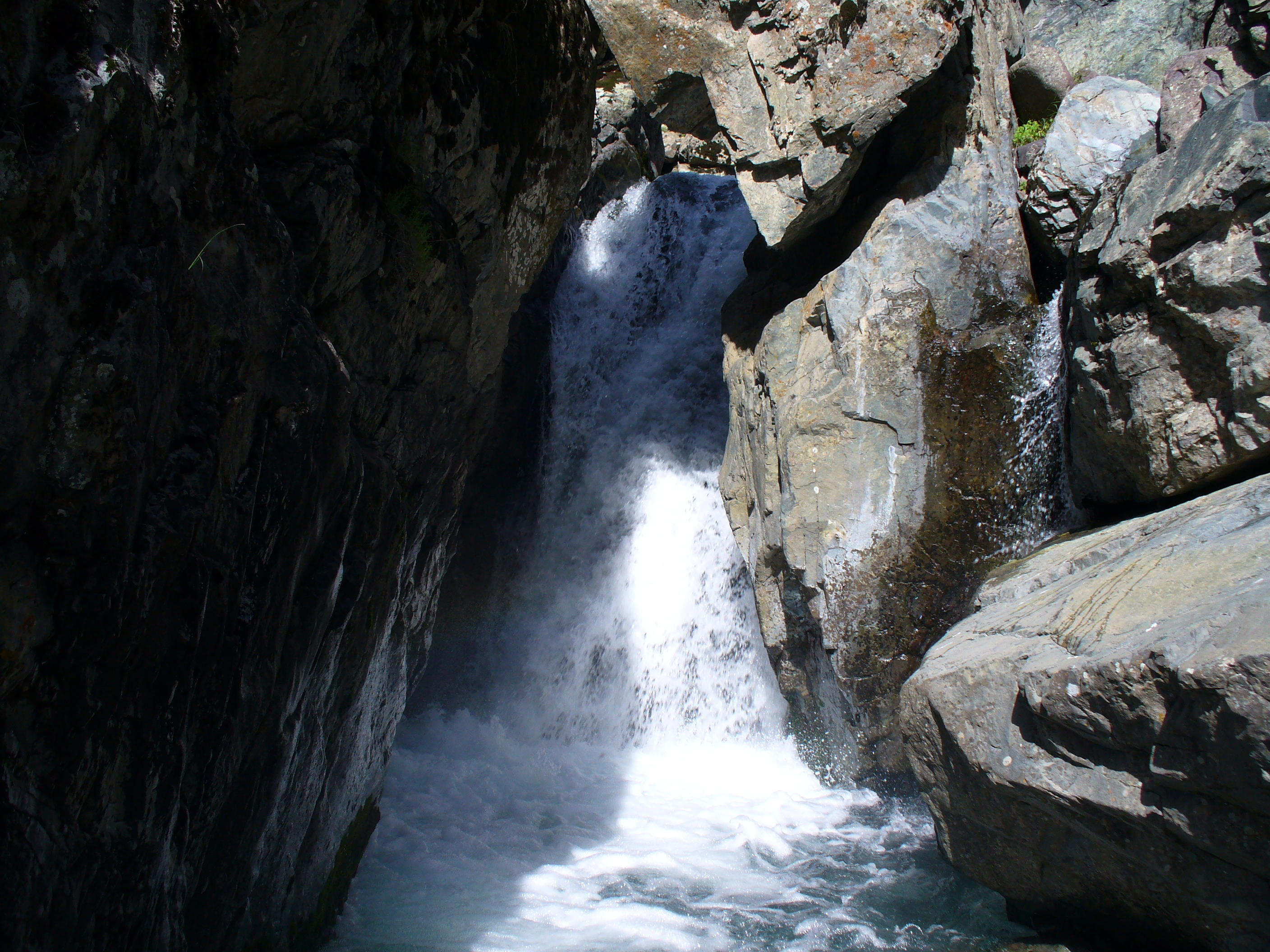 Водопад на реке Кизилсу. Бостанлыкский район, Ташкентская область, Республика Узбекистан.